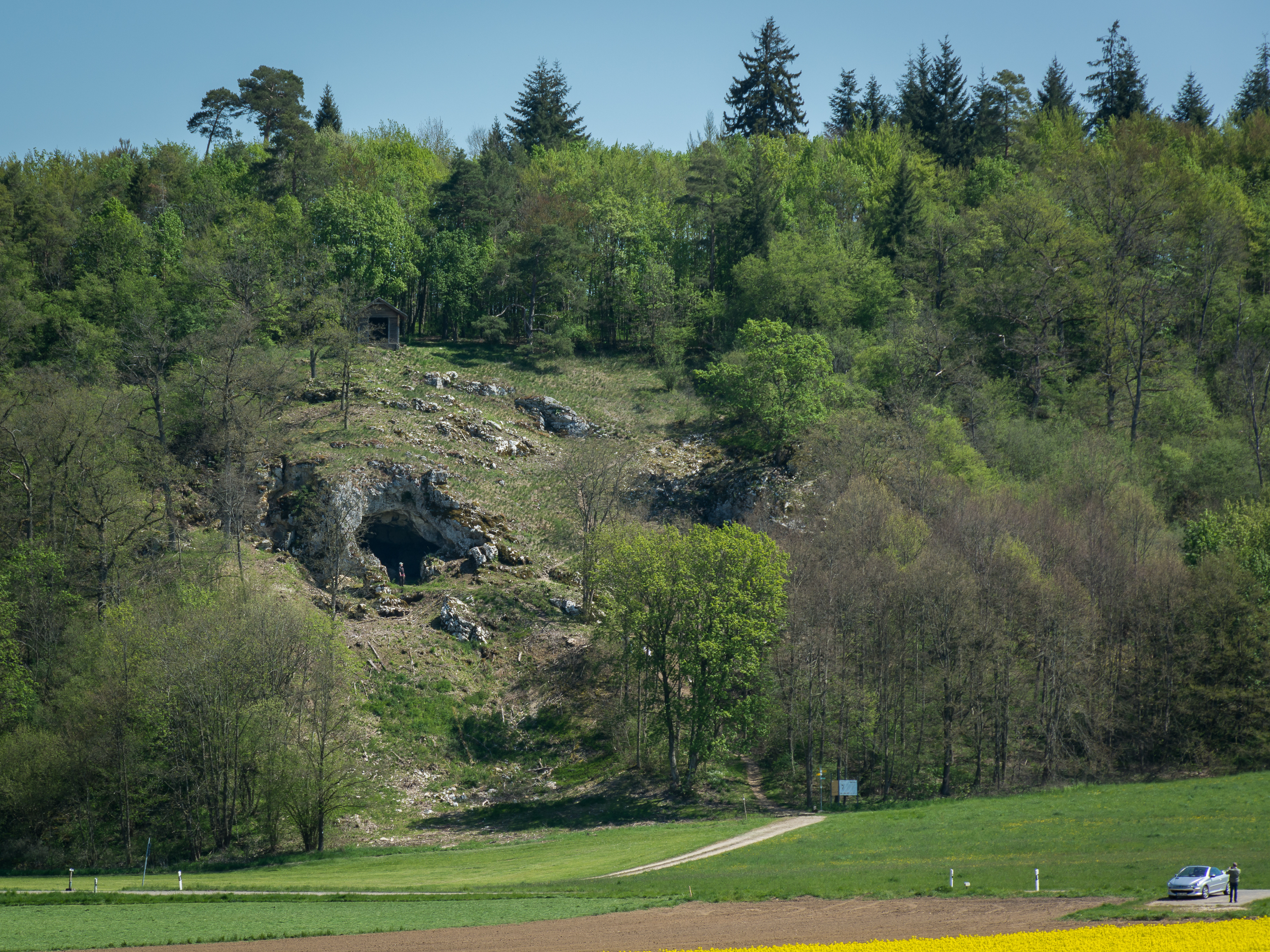 Die Bocksteinhöhle im Lonetal bei Bissingen.